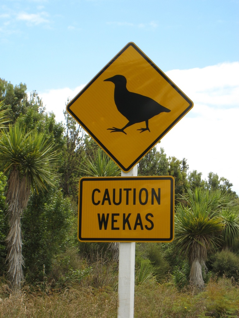 Weka warning street sign